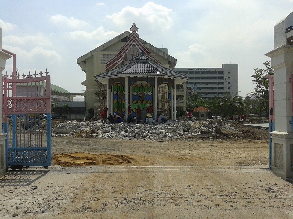 หอประดิษฐานพระพุทธรูปหลวงพ่อสวนกุหลาบ(หลังเก่า) ขณะทำการรื้อถอน